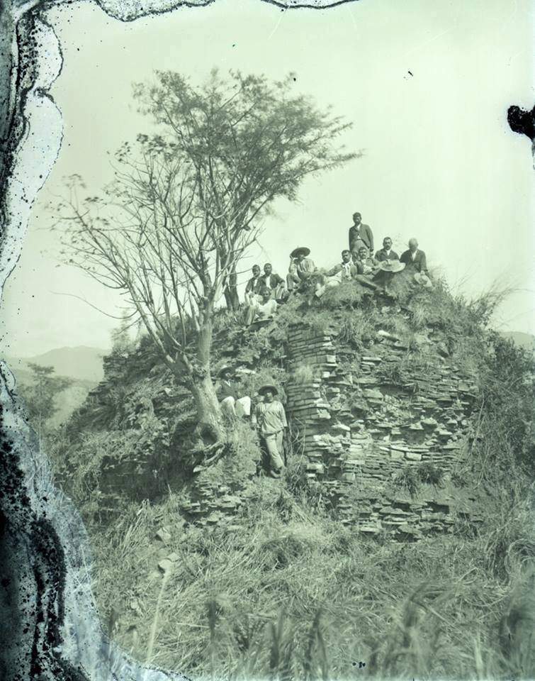 Sitio arqueológico de Iximché en la década de 1920.